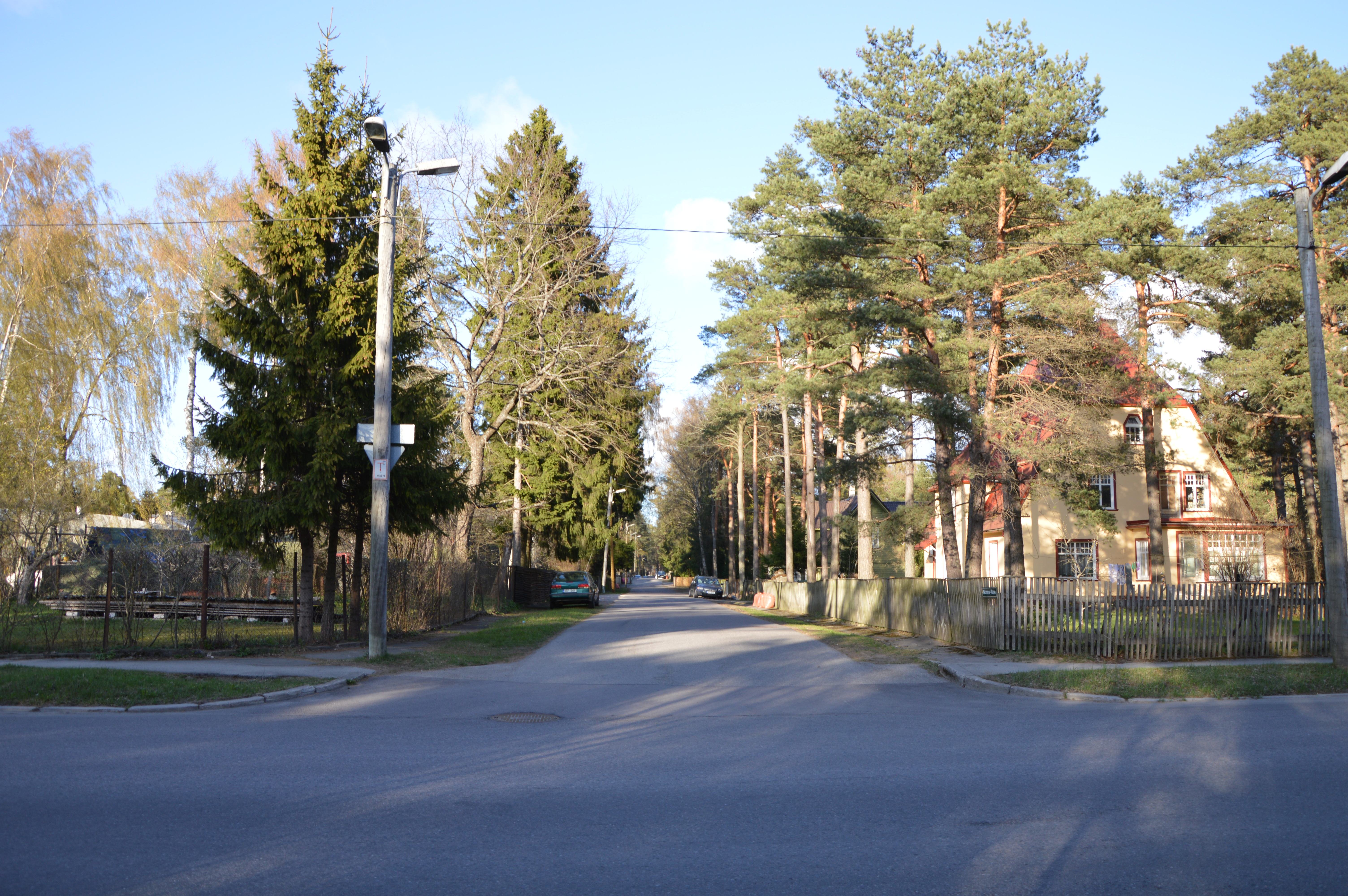 Vaade Nõmme-Kase tänavale Pargi tänavalt